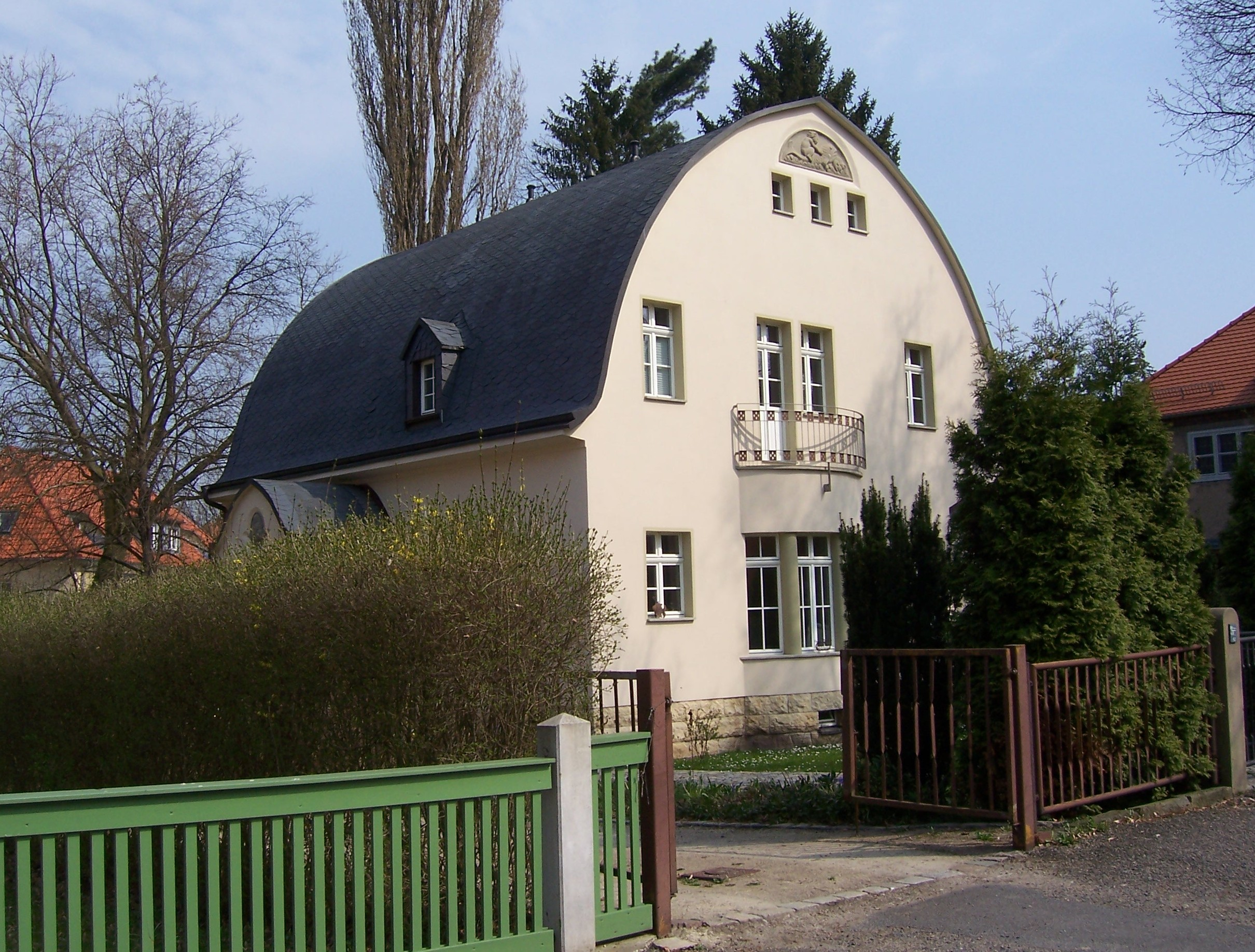 Wohnhaus des Malers Friedrich Alfred Oehme (1881–1935) in Dresden-Klotzsche; Architekt: Woldemar Kandler.